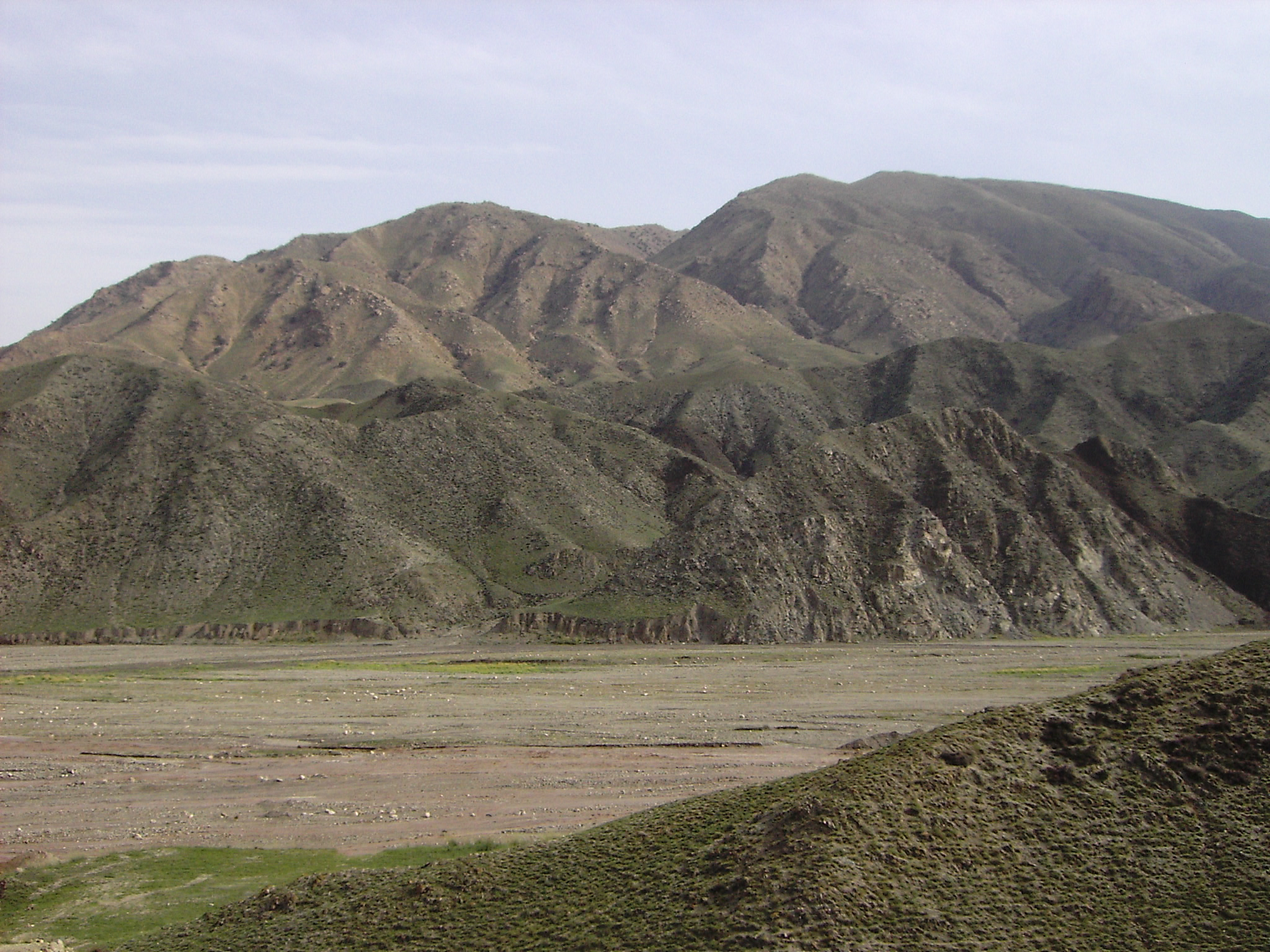 贺兰山